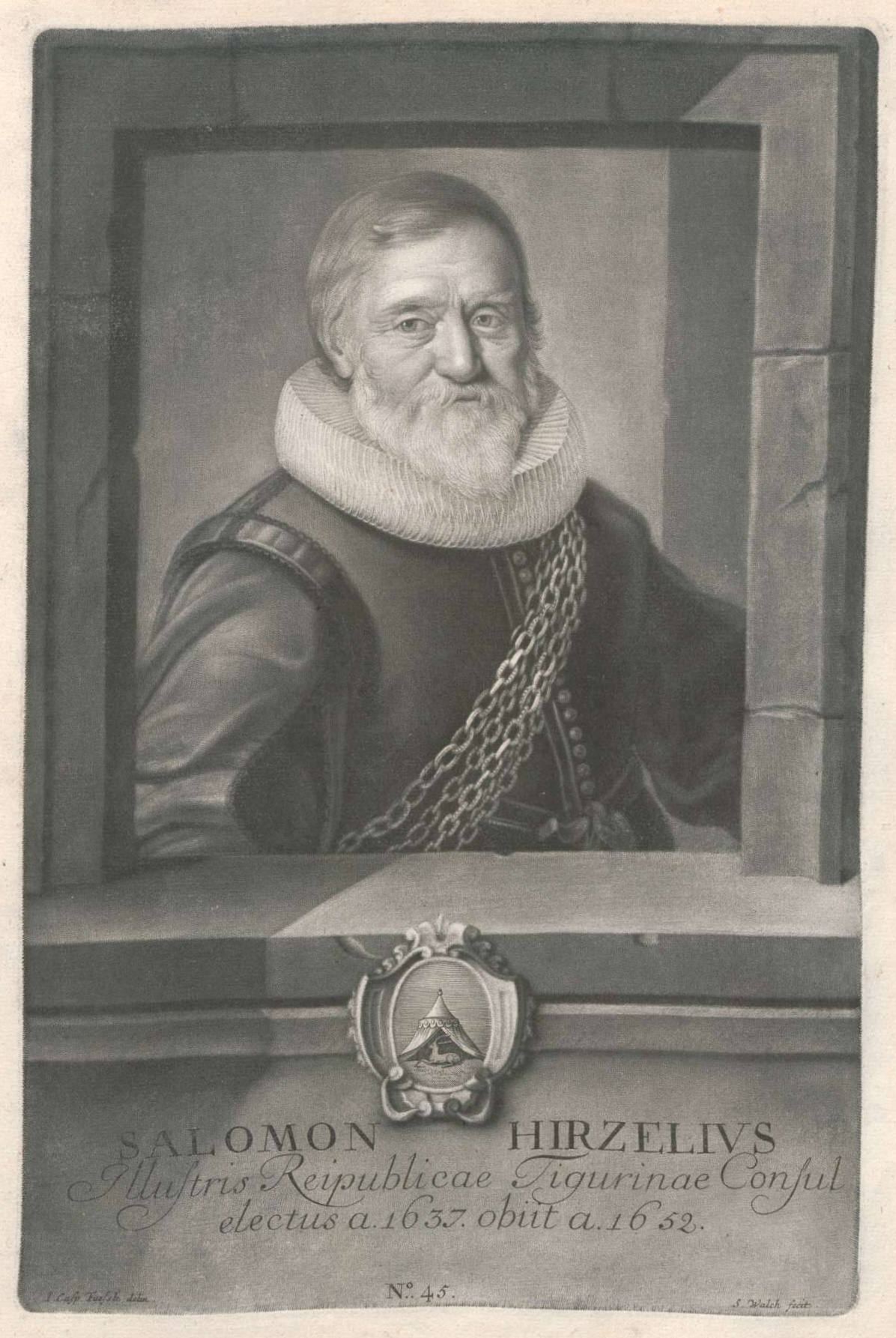 Sebastian Walch: Portraits aller Herren Burger-Meistern, Der Vortrefflichen Republique, Stadt und Vor-Orths Zürich Von dem 1336ten biß auf das 1742te Jahr. Kempten 1756. Kupferstiche von Sebastian Walch nach Vorlage von Johann Caspar Füssli. Tafel Nr. 45 Salomon Hirzelius (Salomon Hirzel)